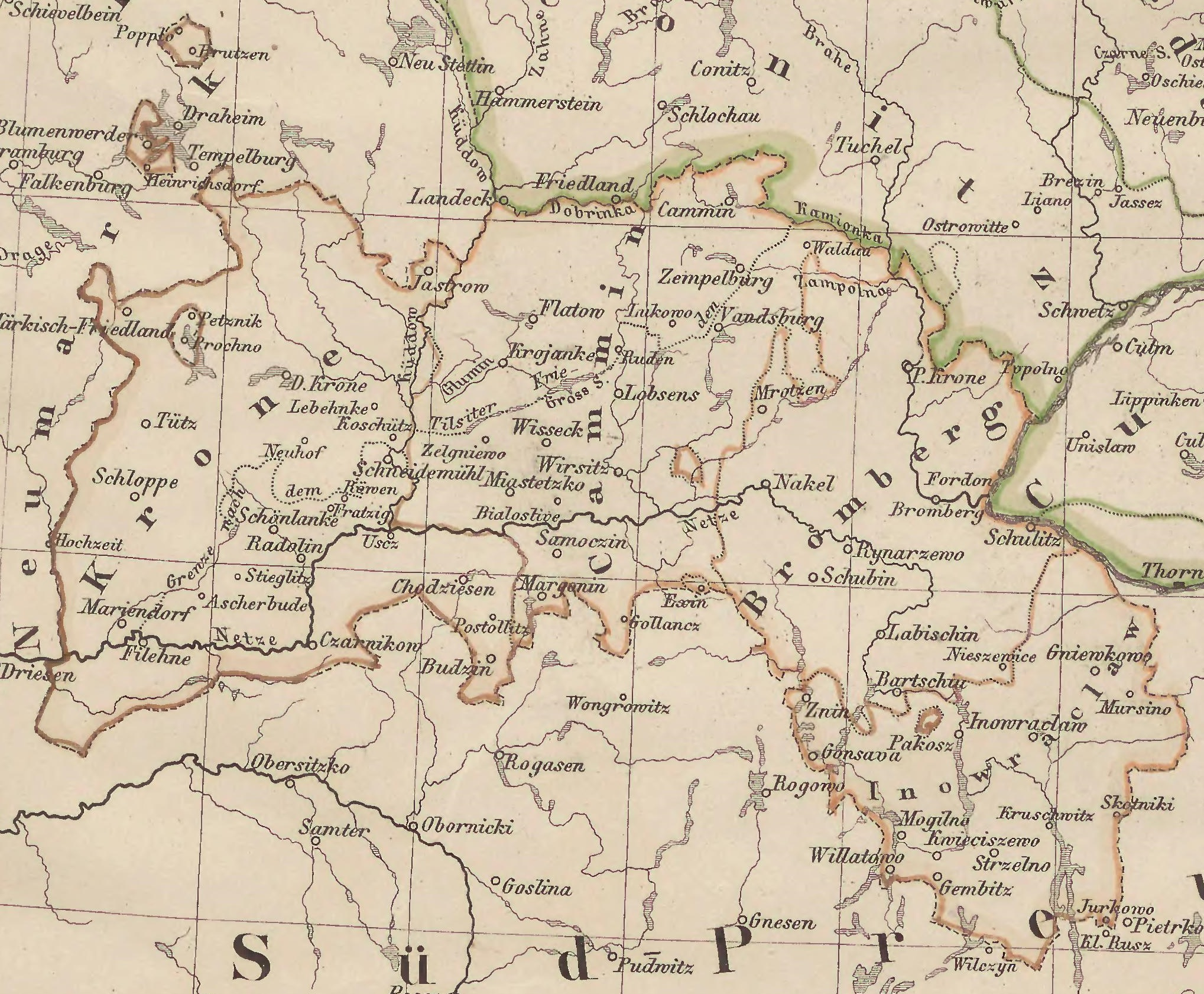 Der Netzedistrikt mit Kreisgrenzen